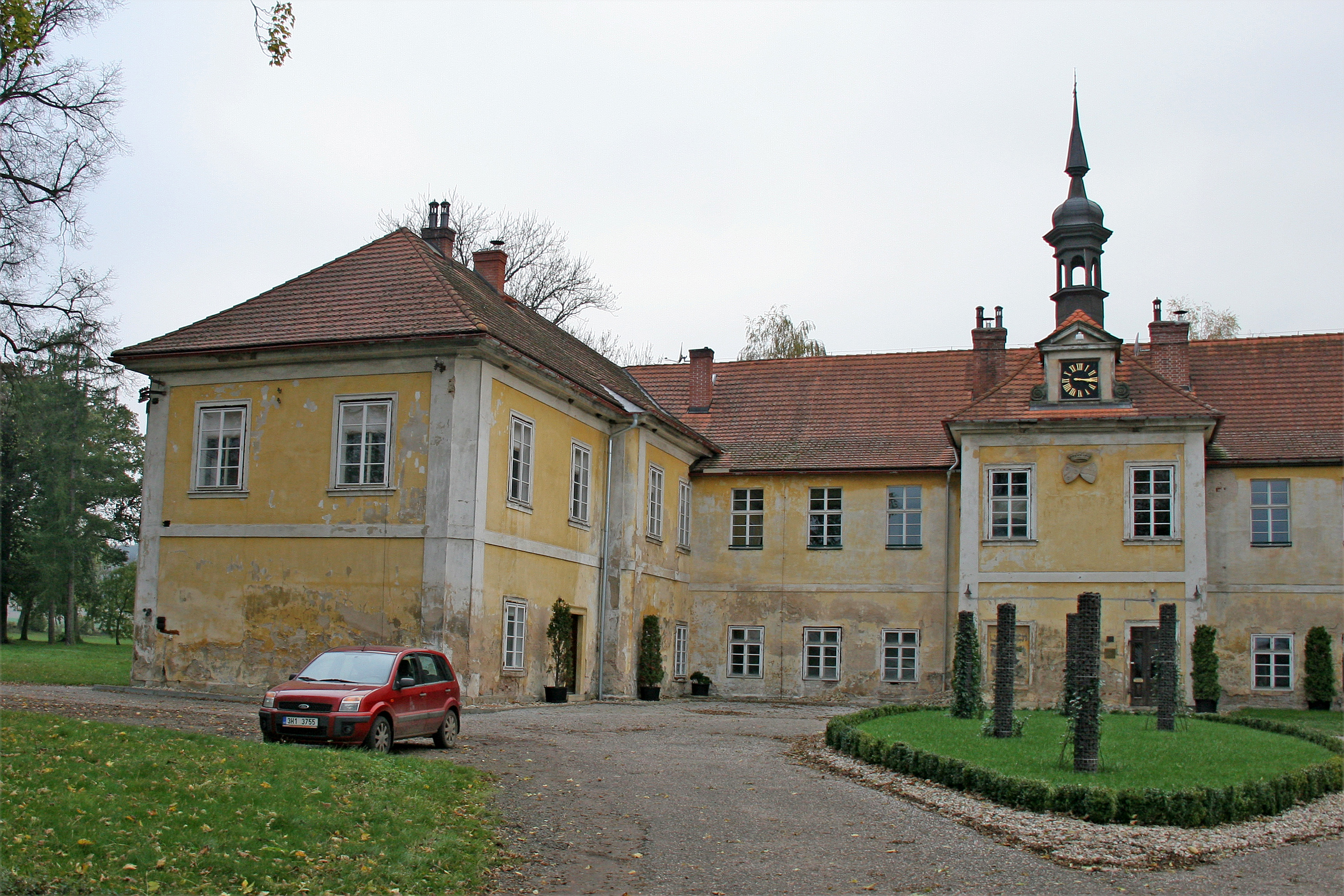 Zámek Vokšice, Vokšice 1, Vokšice.